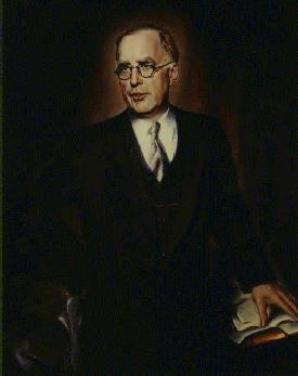 Lewis B. Schwellenbach Upload Source - U.S. Department of Labor Biography evrik ( Lewis B. Schwellenbach)